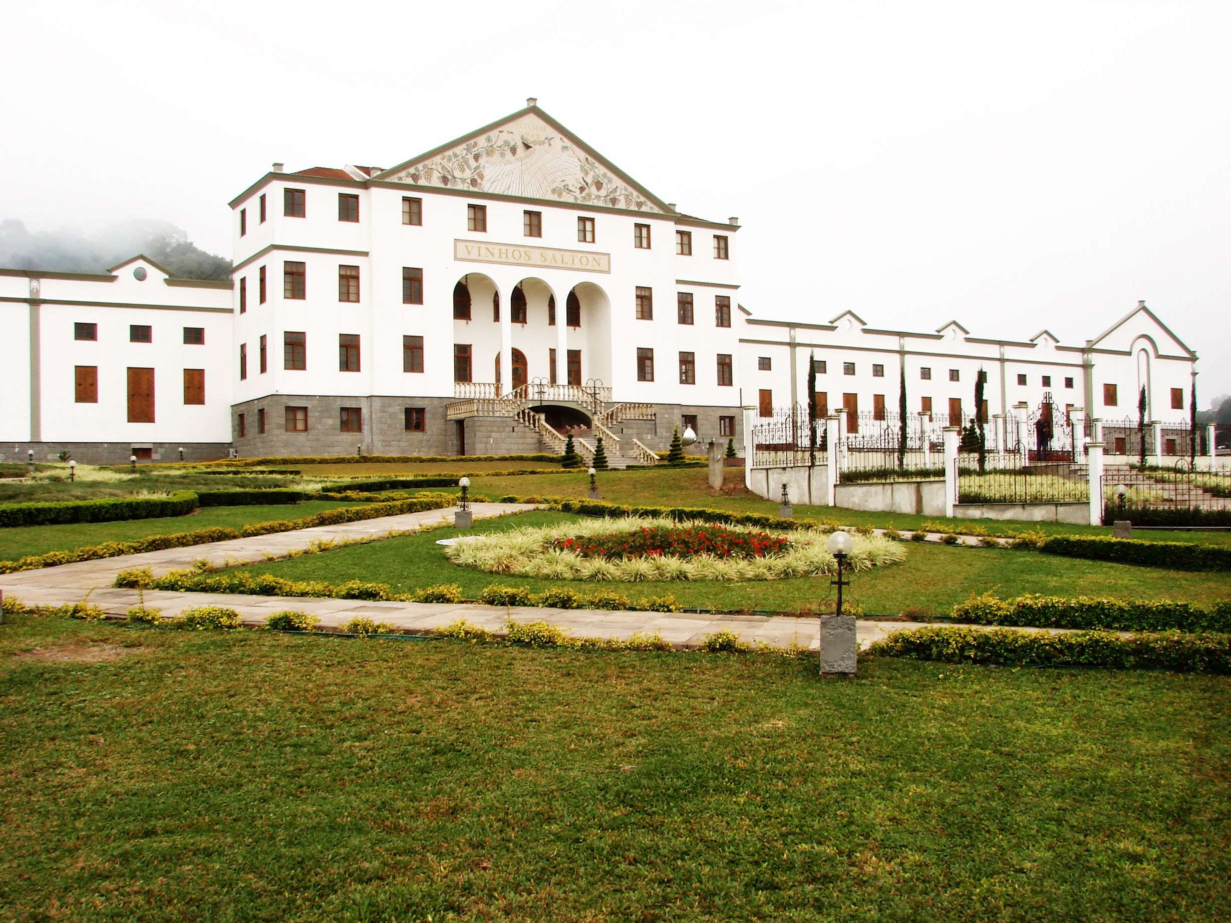 Fachada Vinícola Salton